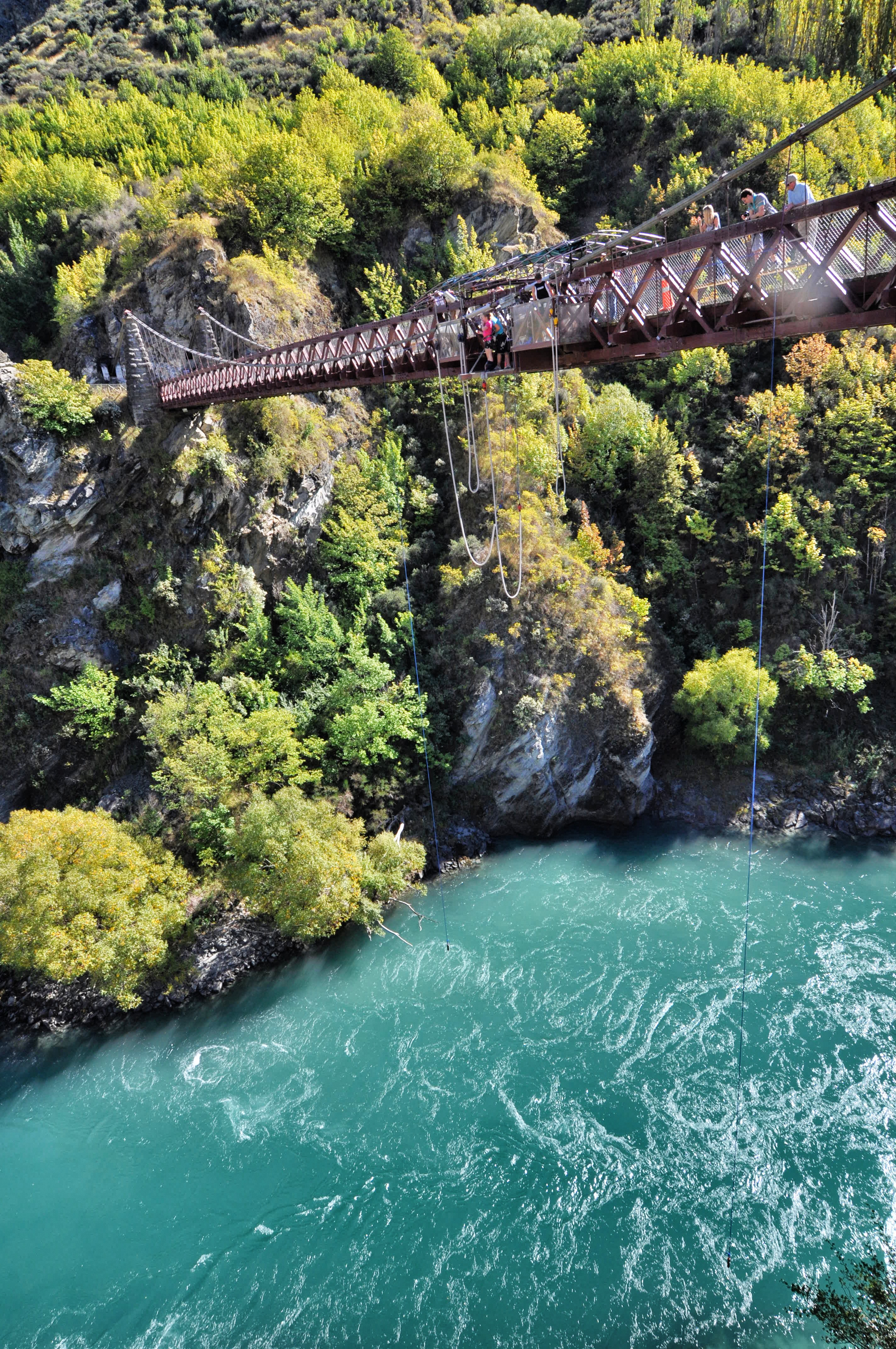 Kawarau Bridge Bungy Jump